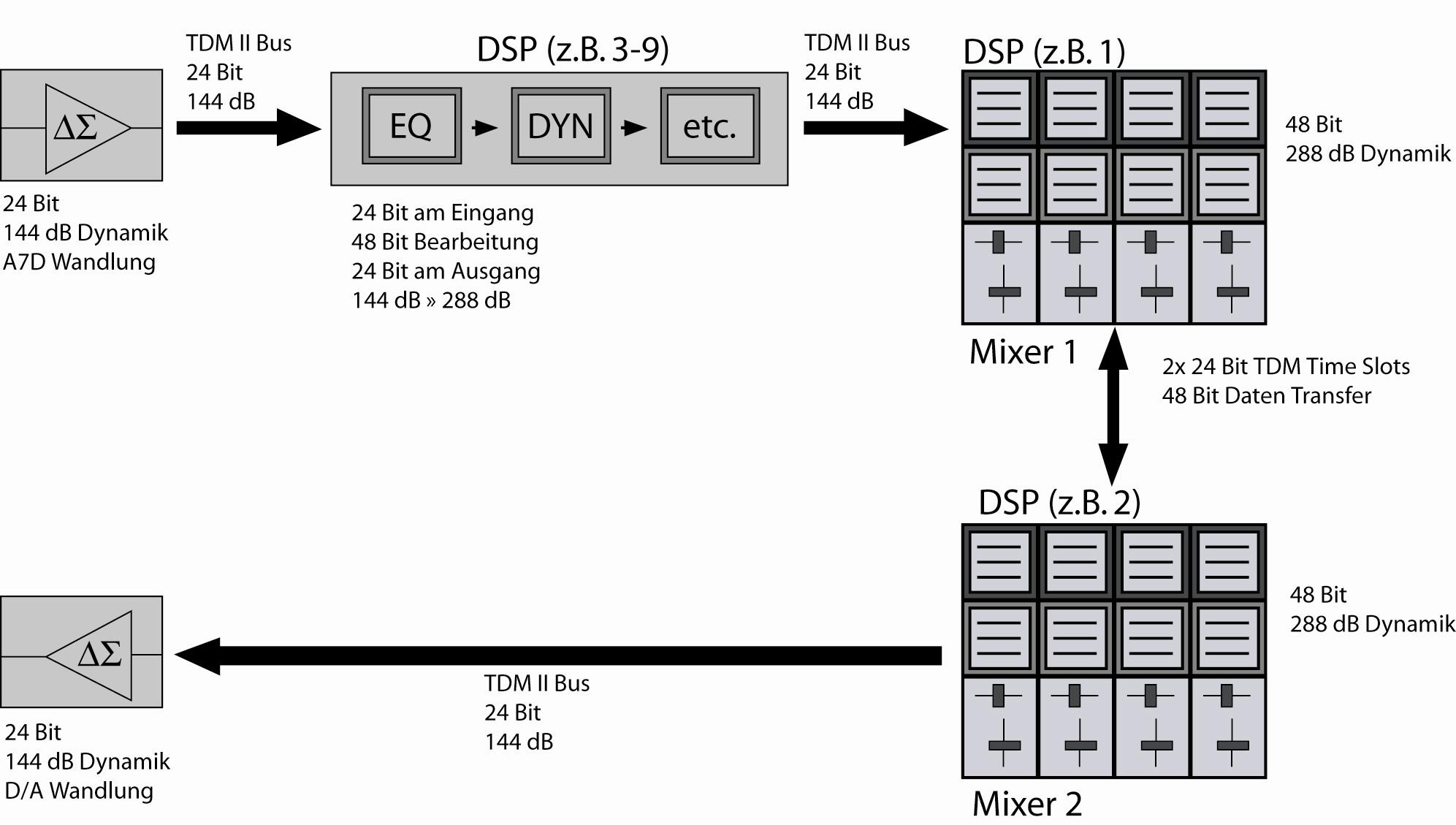 Bitauflösung im Signalverlauf des Pro Tools TDM II Systems